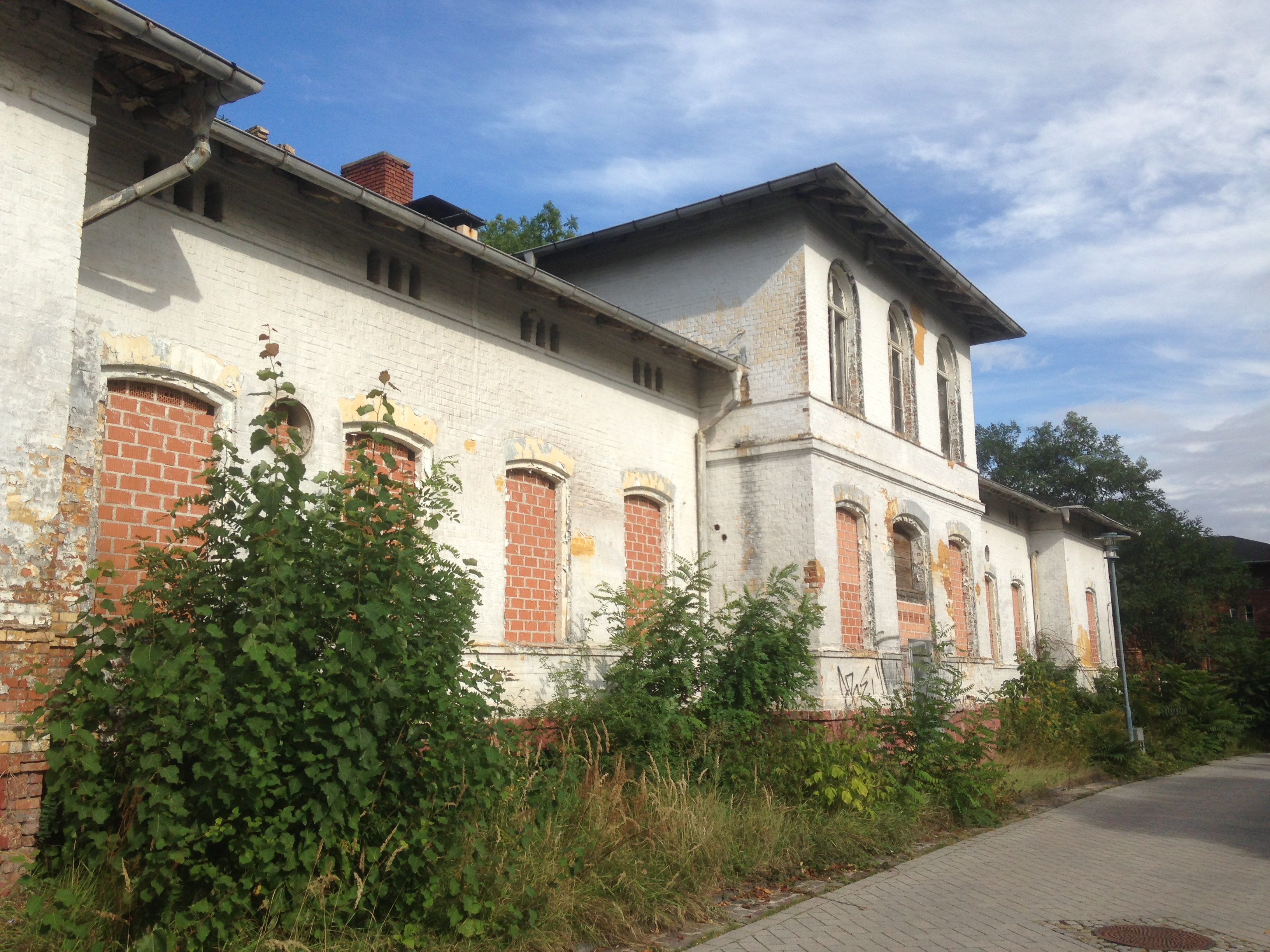 Ruinöses Gebäude ehem. Irrenanstalt Nietleben